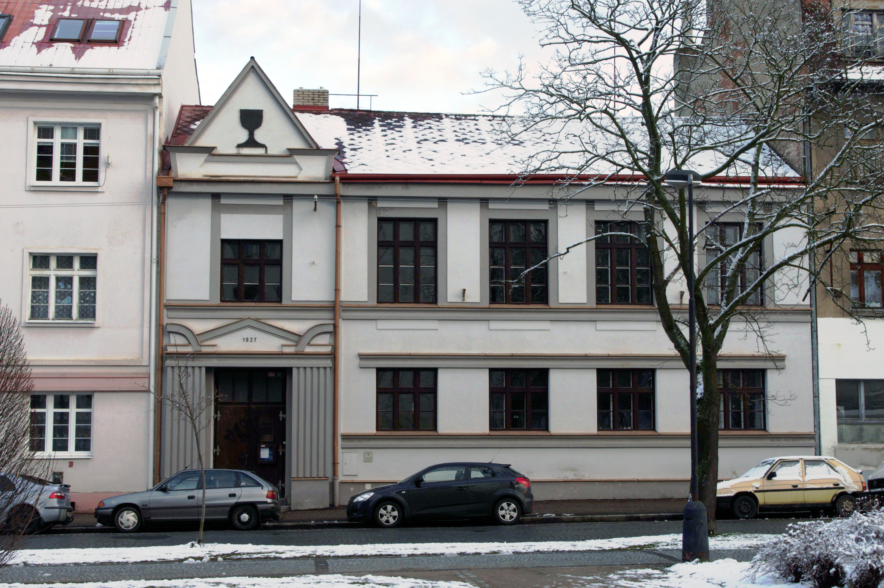 Farní sbor Českobratrské církve evangelické v Benešově